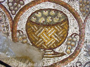 סל עם פגות שקמה מפסיפס ביזנטי כנסיית בית לויה